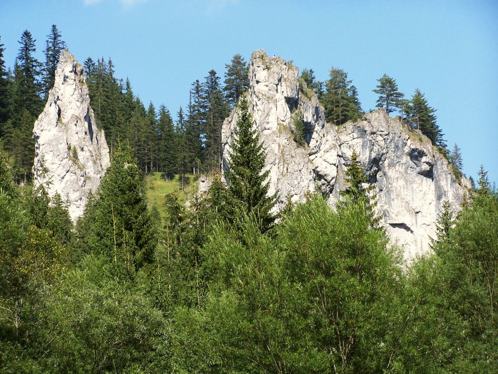 Siwiańskie Turnie (Dolina Chochołowska, Tatry)